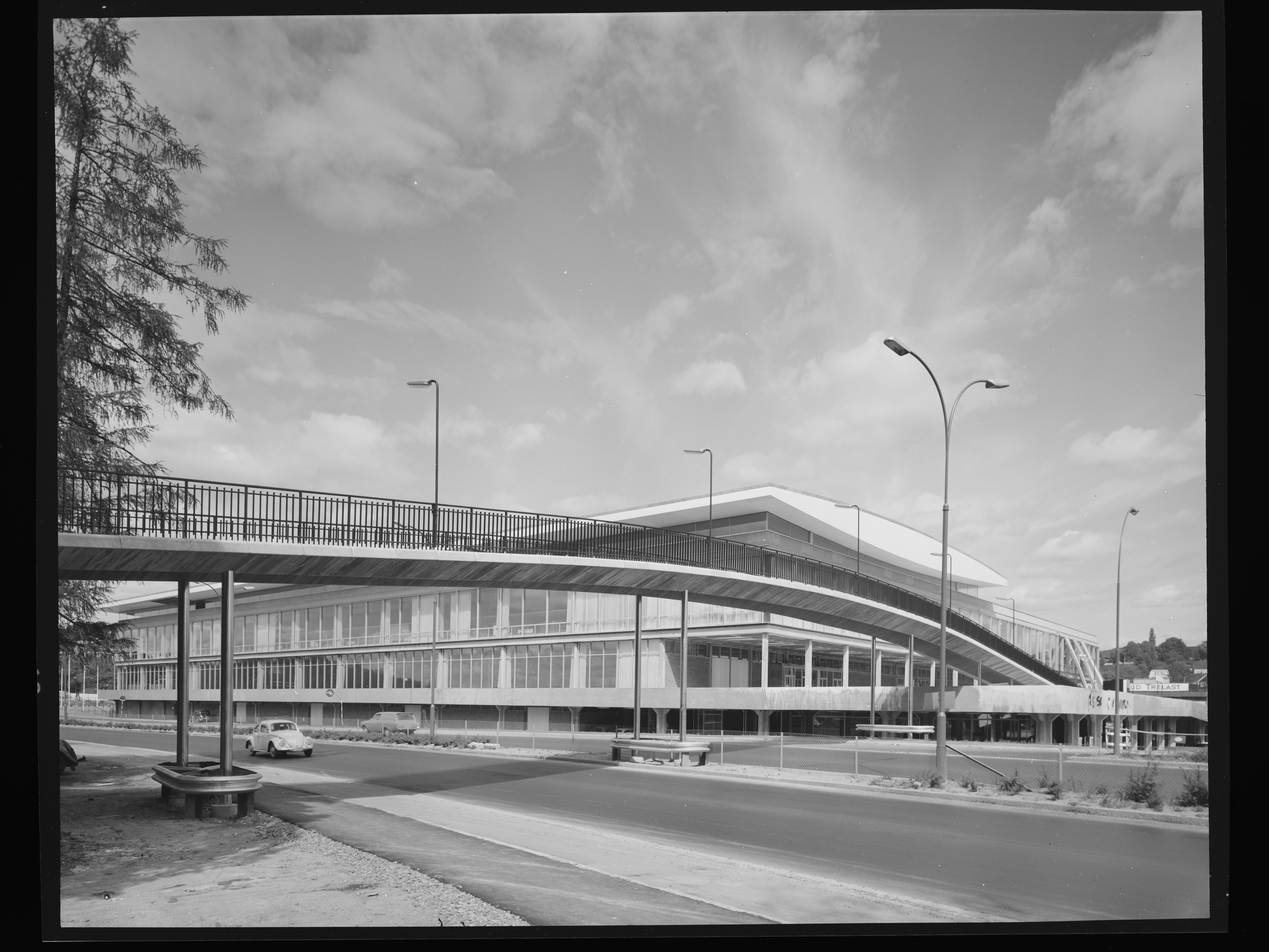 Bildet er hentet fra Nasjonalbibliotekets bildesamling Oslo,Sjølyst, Oslo, Oslo